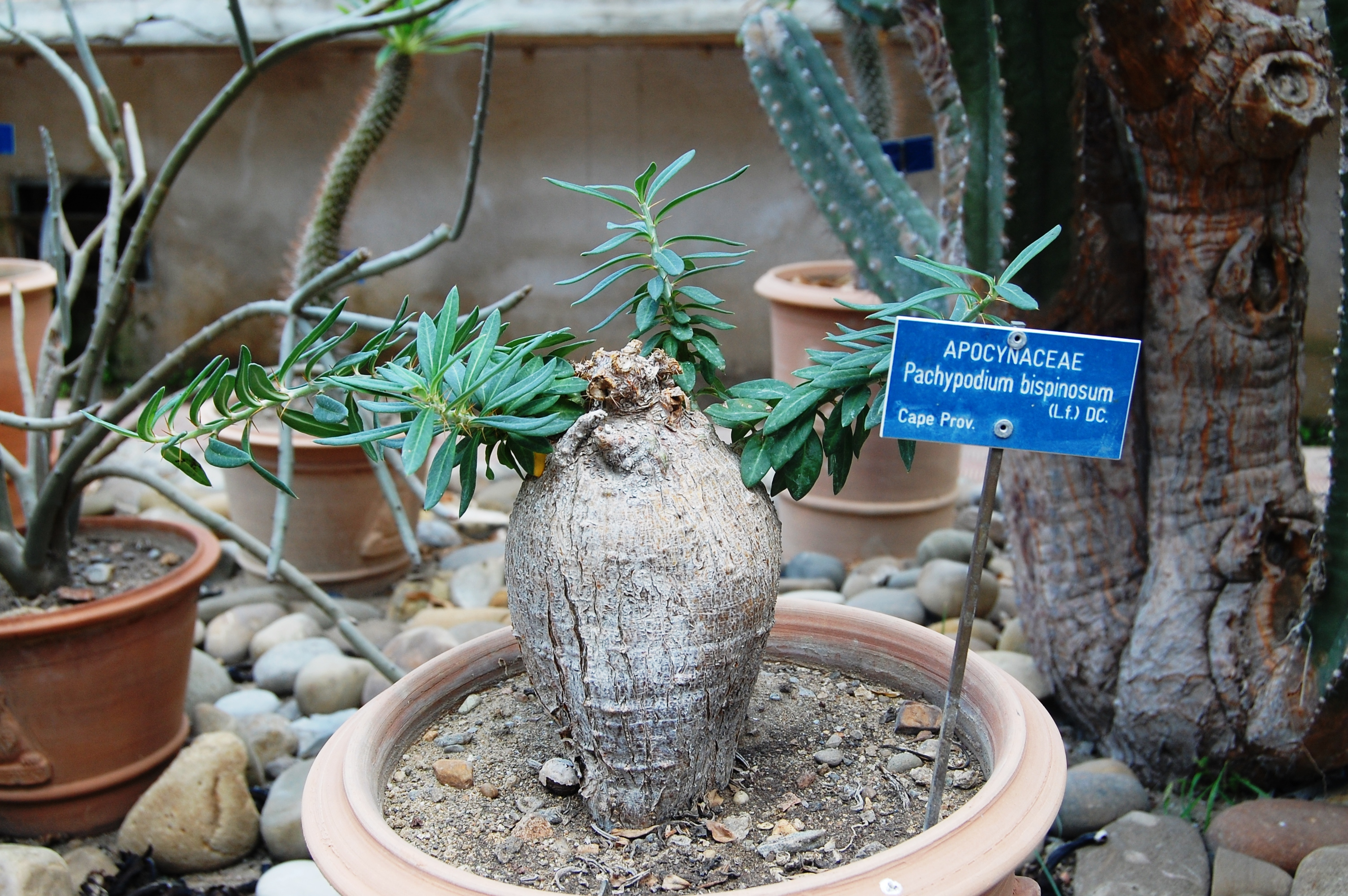 Pachypodium bispinosum Orto botanico di Palermo